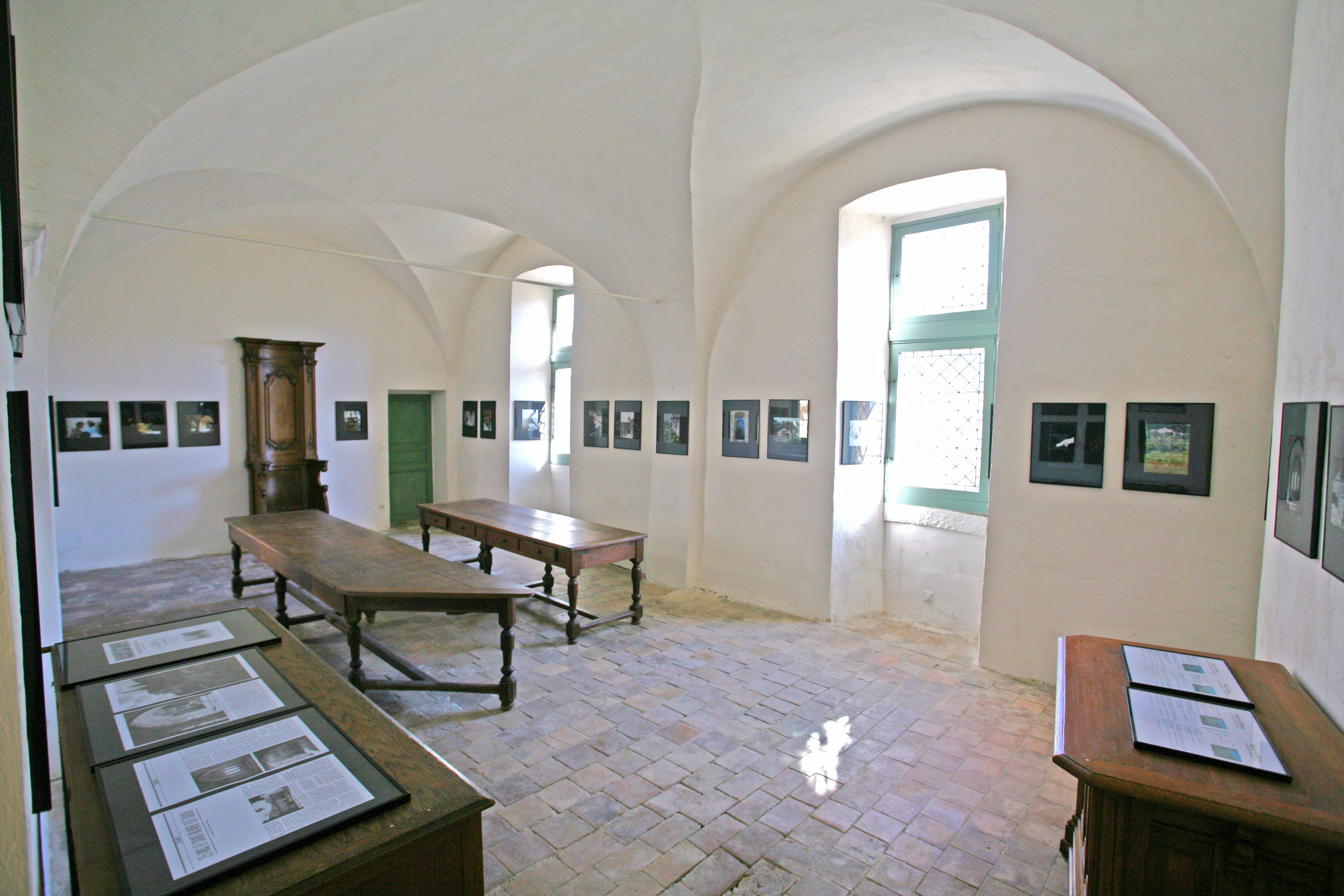 La salle capitulaire de l'abbaye Saint-Hilaire de Ménerbes, France